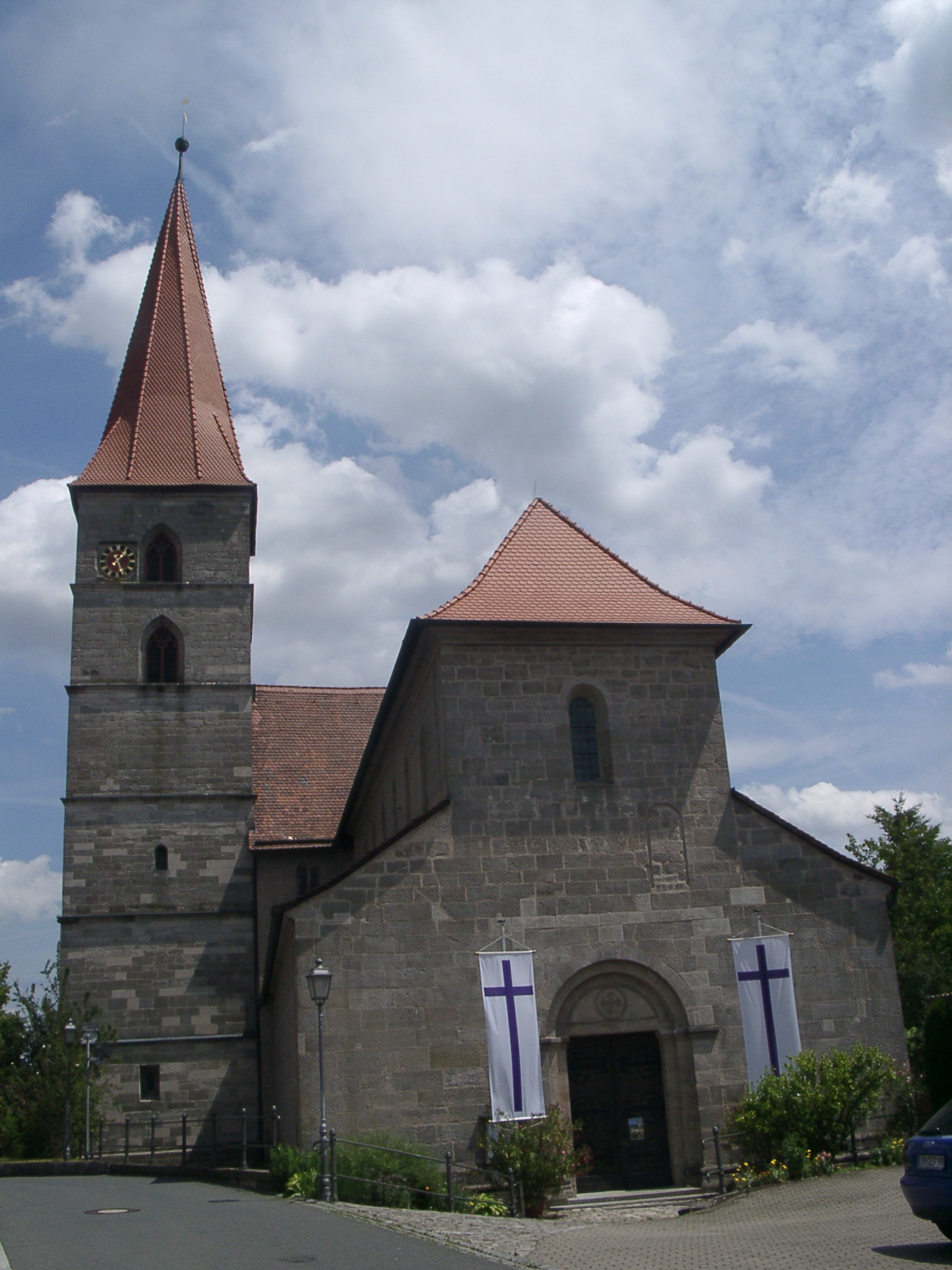 Münchaurach, Klosterkirche